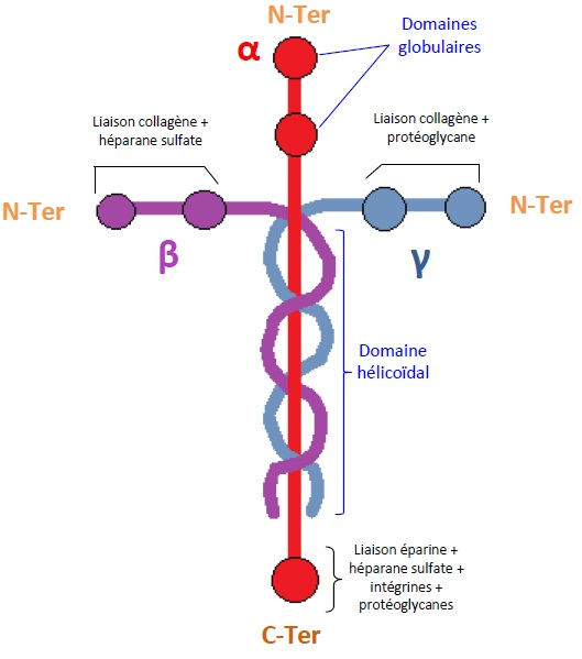 structure de la lamine et ses interactions